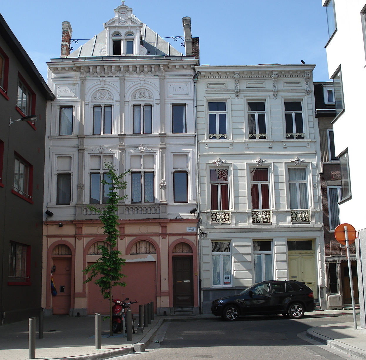 Antwerpen, wijk 'Klein-Antwerpen', huizen hoek Florisstraat - Rembrandtstraat.